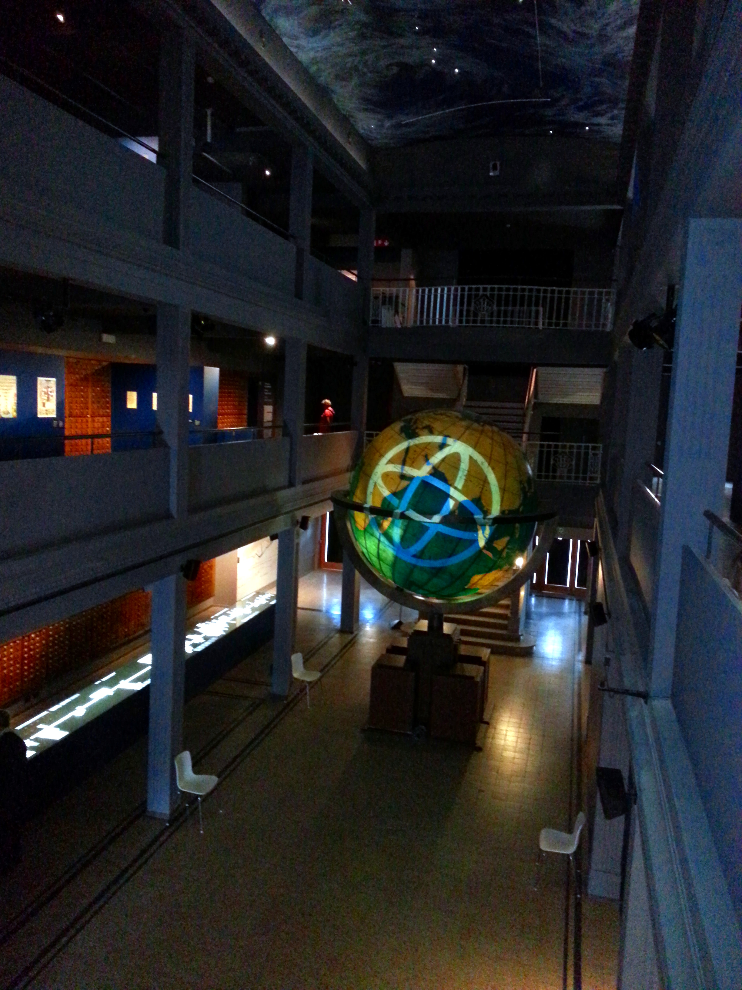 Innenaufnahme des Mundaneum Native namePalais Mondial LocationMonsCoordinates50° 27′ 27.58″ N, 3° 57′ 19.66″ E Established1898 Web page control : Q451 VIAF: 147927519 ISNI: 0000 0001 2254 500X LCCN: n98028763 GND: 10161506-1 NKC: kn20070611012 WorldCat institution QS:P195,Q451 genauer gesagt der Ausstellung "Mapping Knowledge"